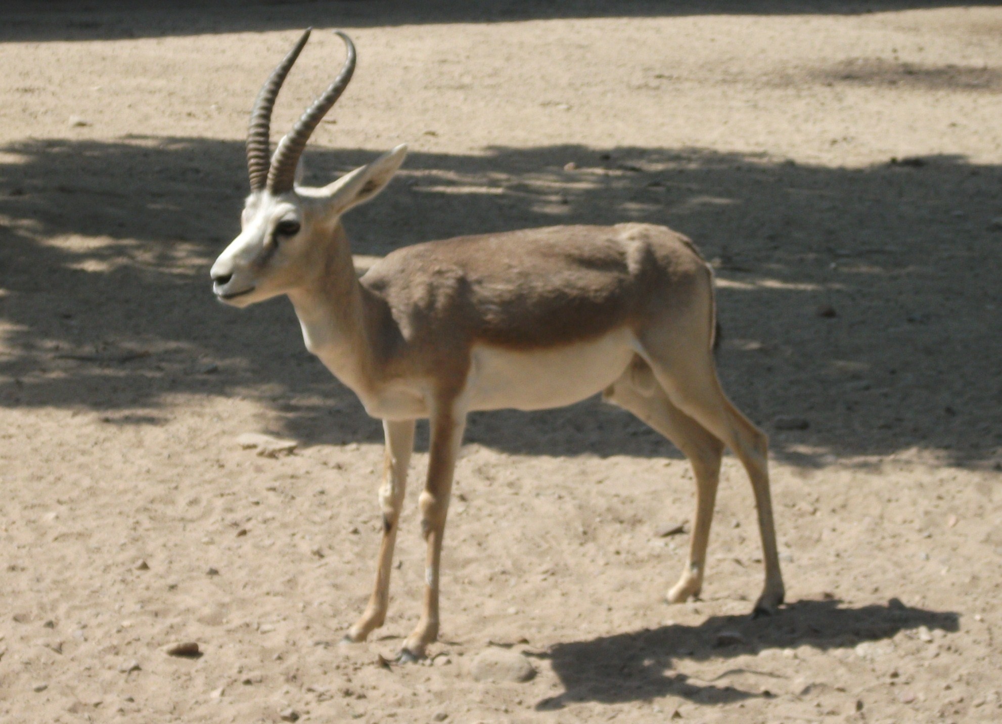 Самец джейрана в зоопарке Ташкента